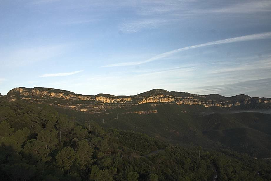 Cingles de Bertí-Serralada prelitoral. l'Ametlla del Vallès-Montmany-Bigues (Vallès Oriental, Catalunya)